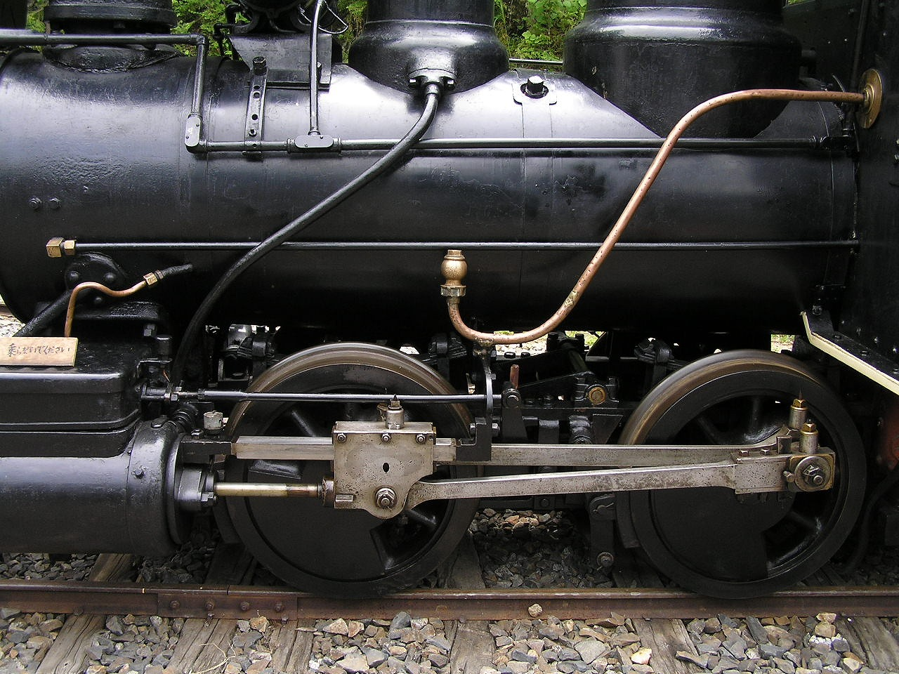 ボールドウィン1号動輪 赤沢自然休養林